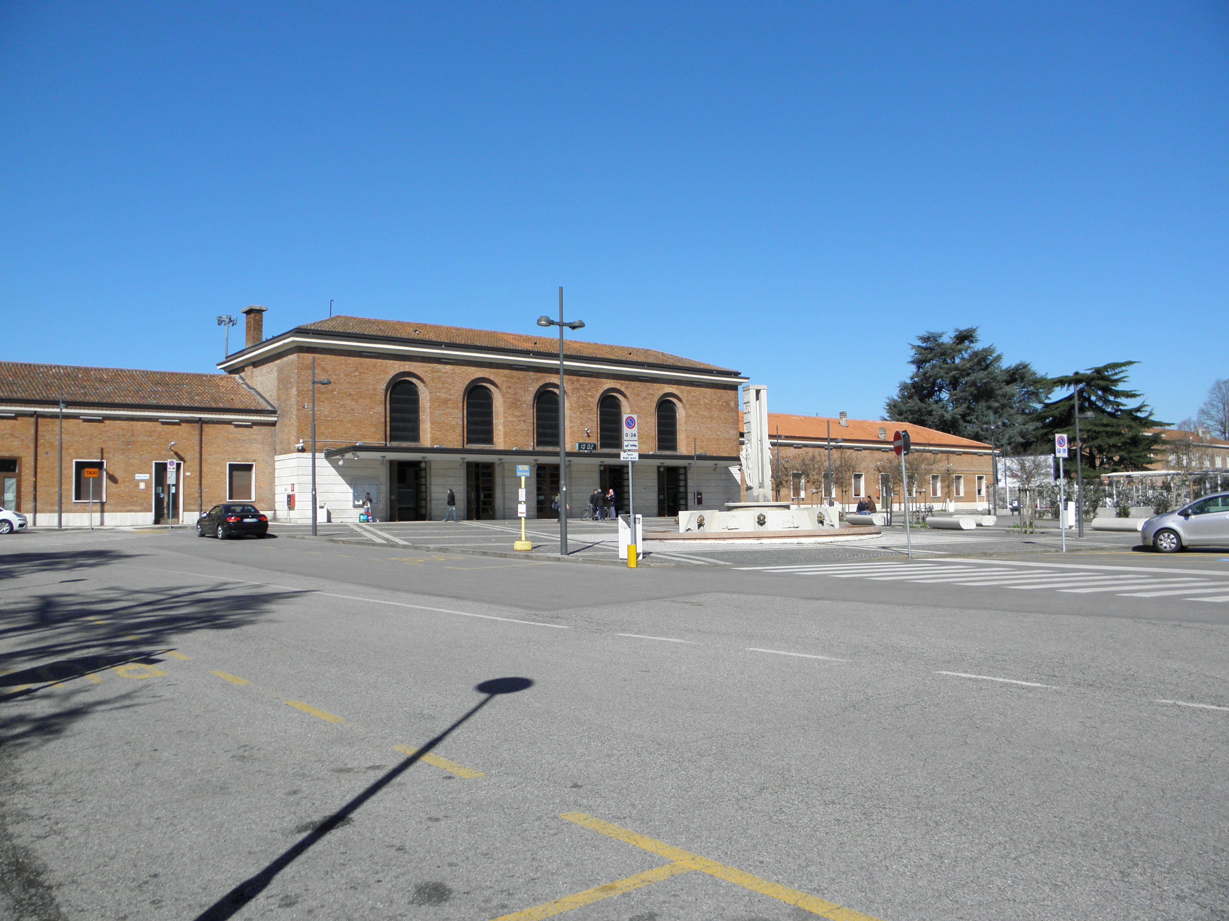 Stazione di Rovigo